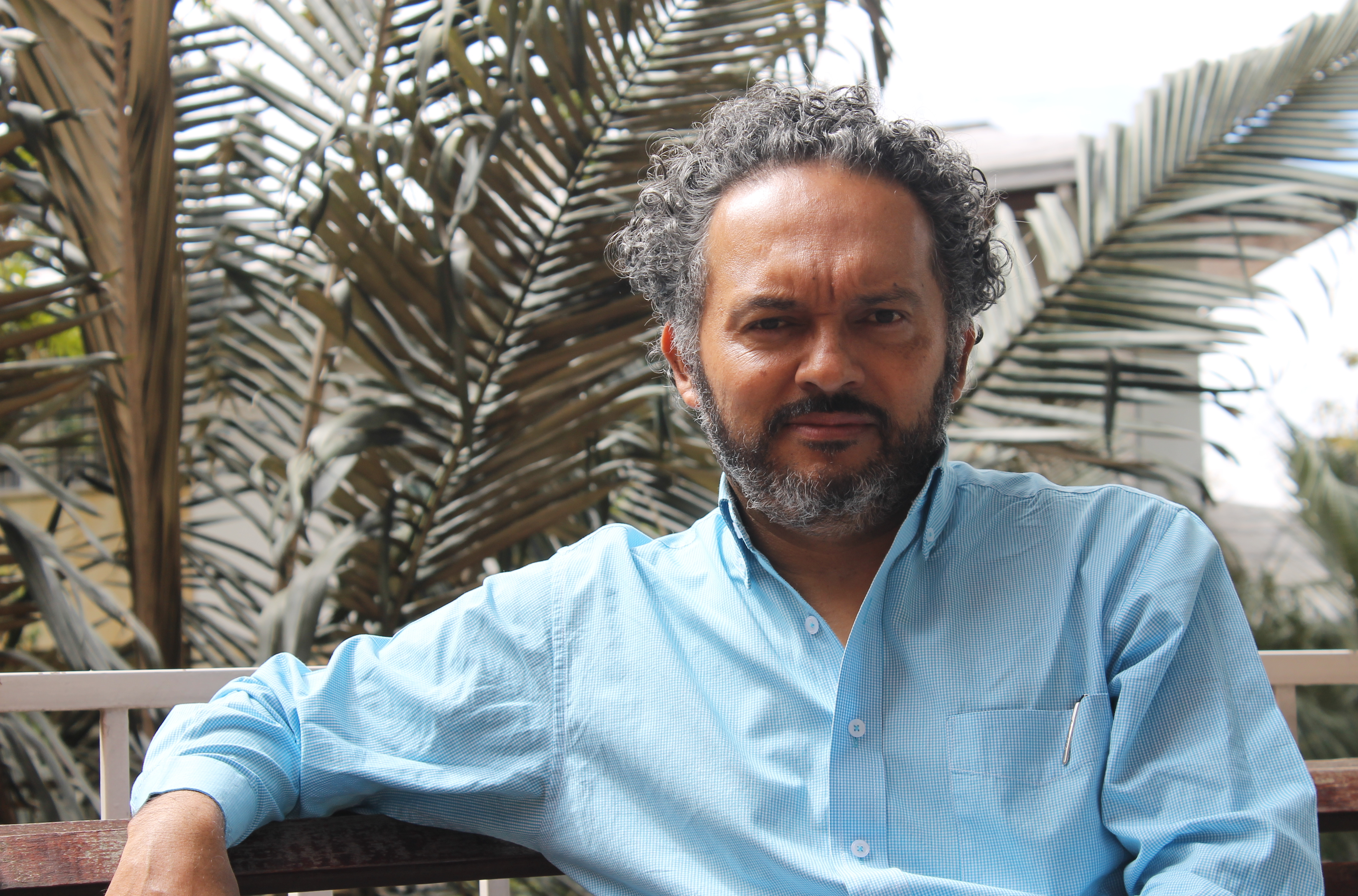 Miguel Ángel Manrique por Juan Pablo Rocca (2018)